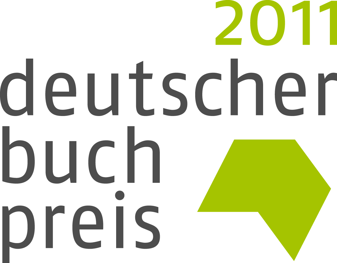 Logo Deutscher Buchpreis 2011